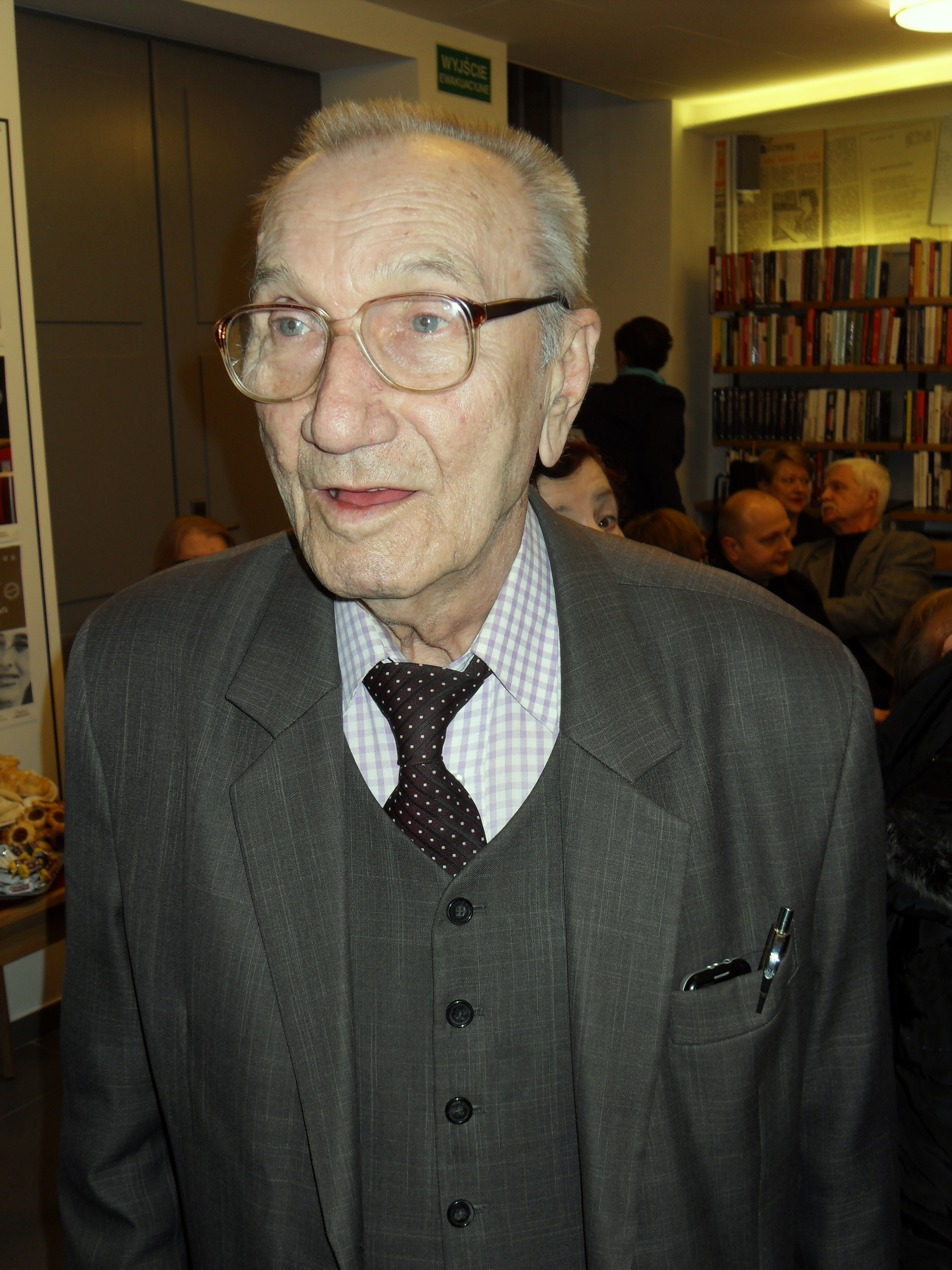 Prof. Józef Bachórz, filolog polski.